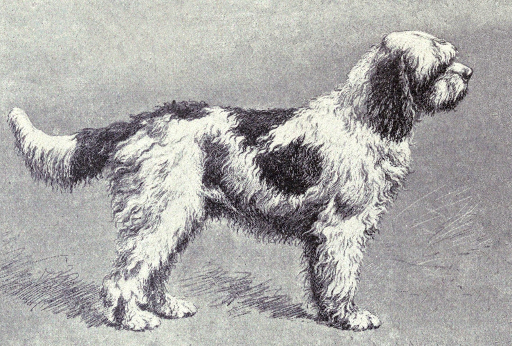 Barbet from 1915